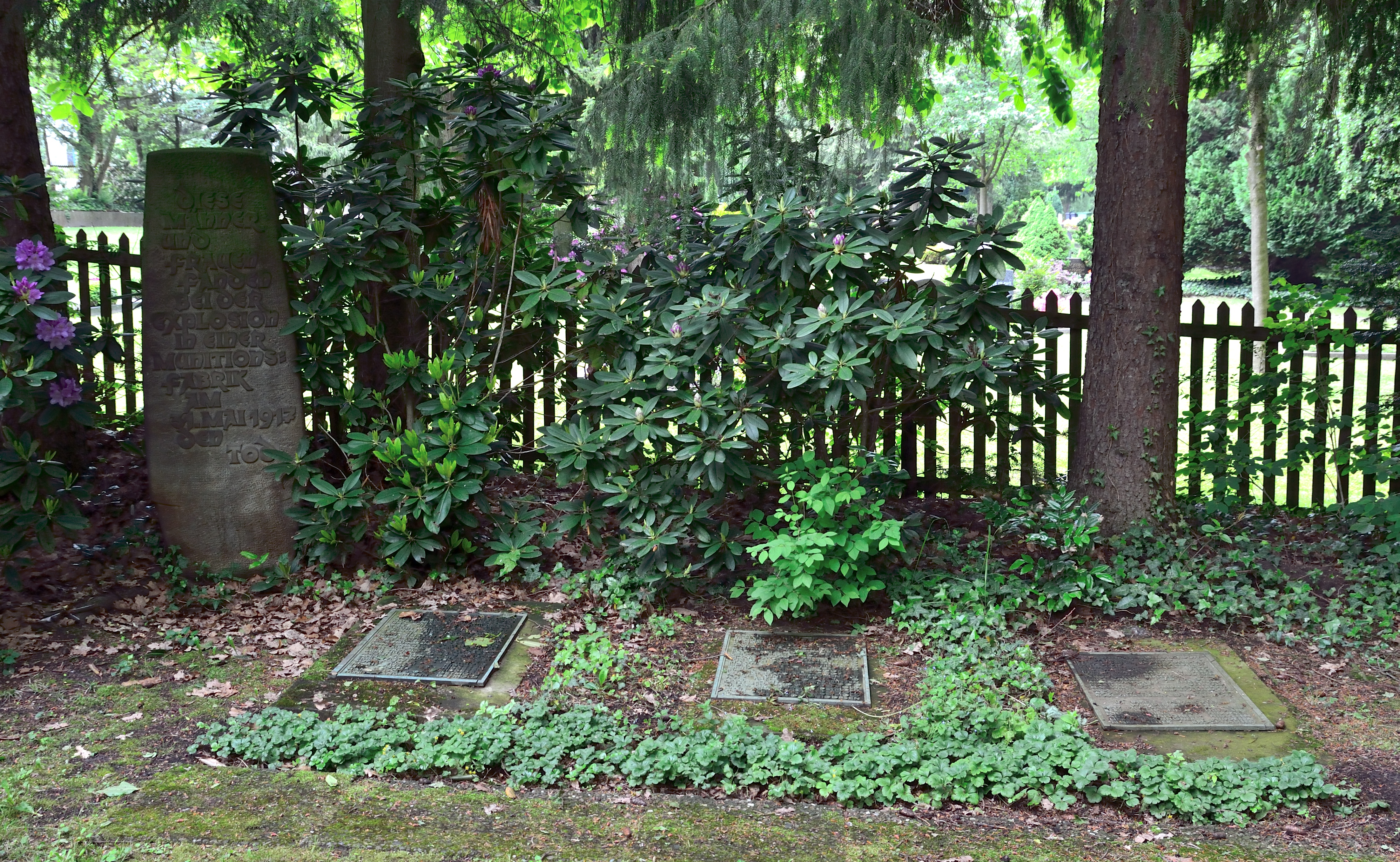 Denkmal für die Opfer der Explosion in der Munitionsfabrik in Detmold 1917